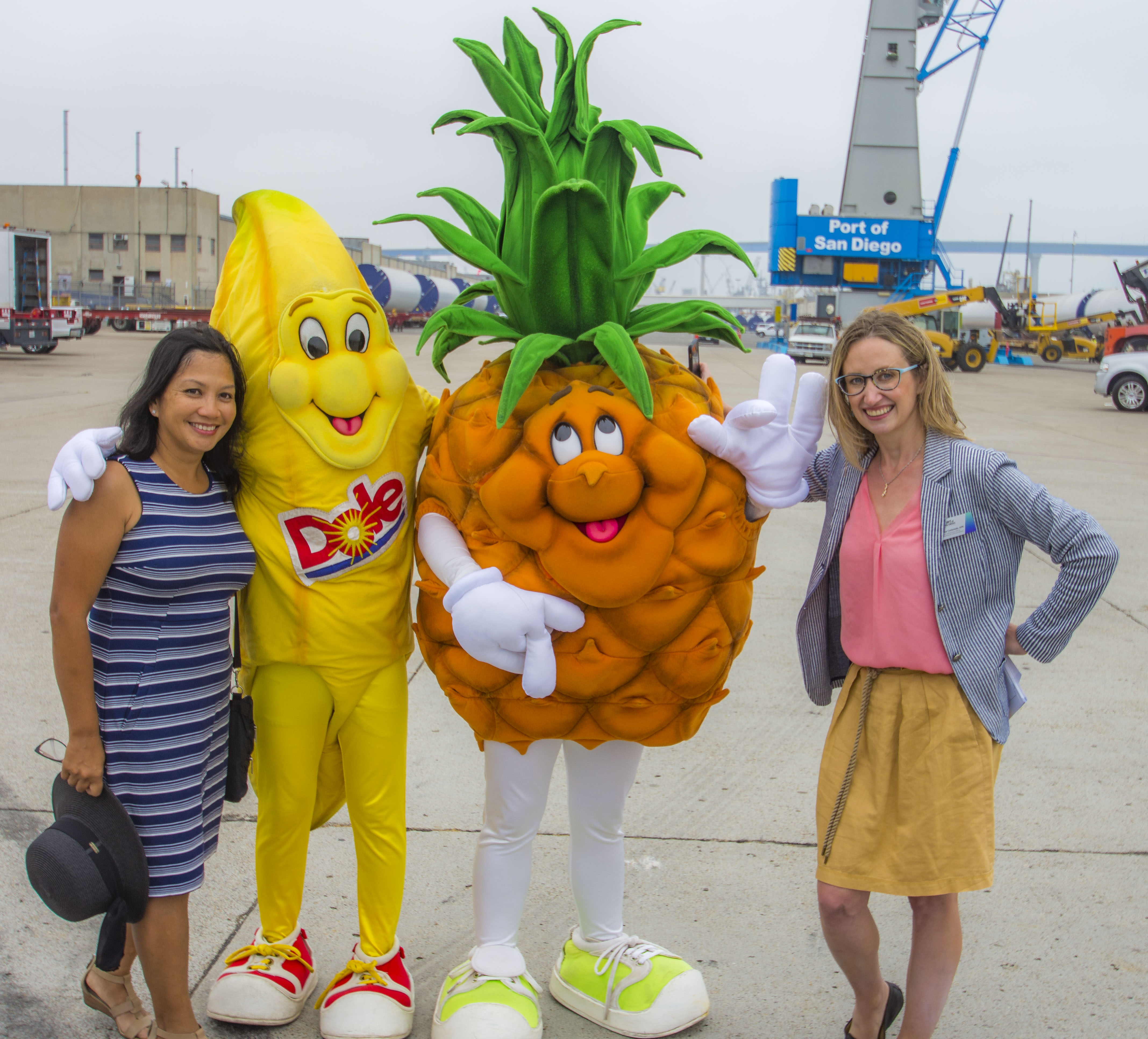 20180726 TAMT _1